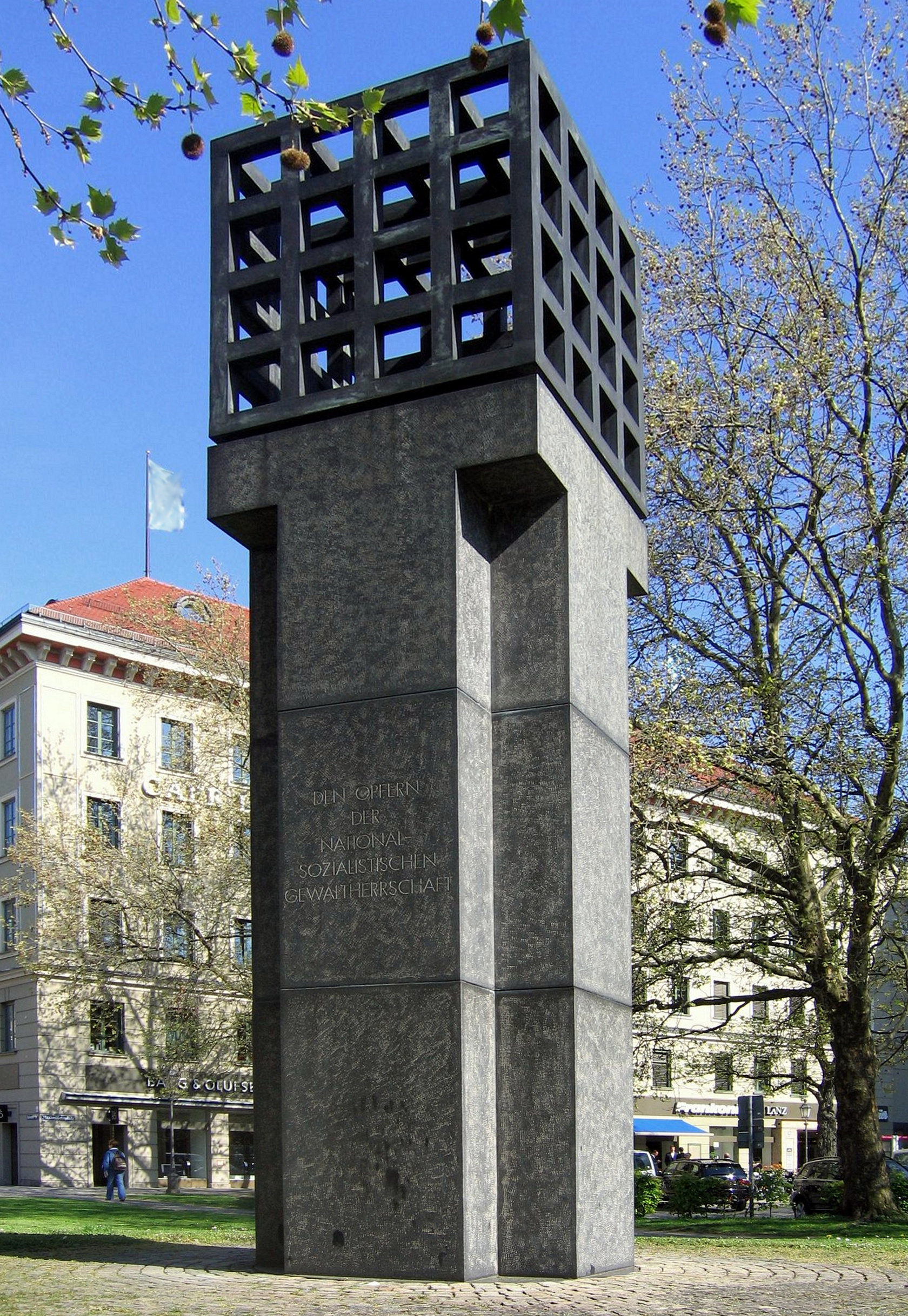 Mahnmal für die Opfer der NS-Gewaltherrschaft in München